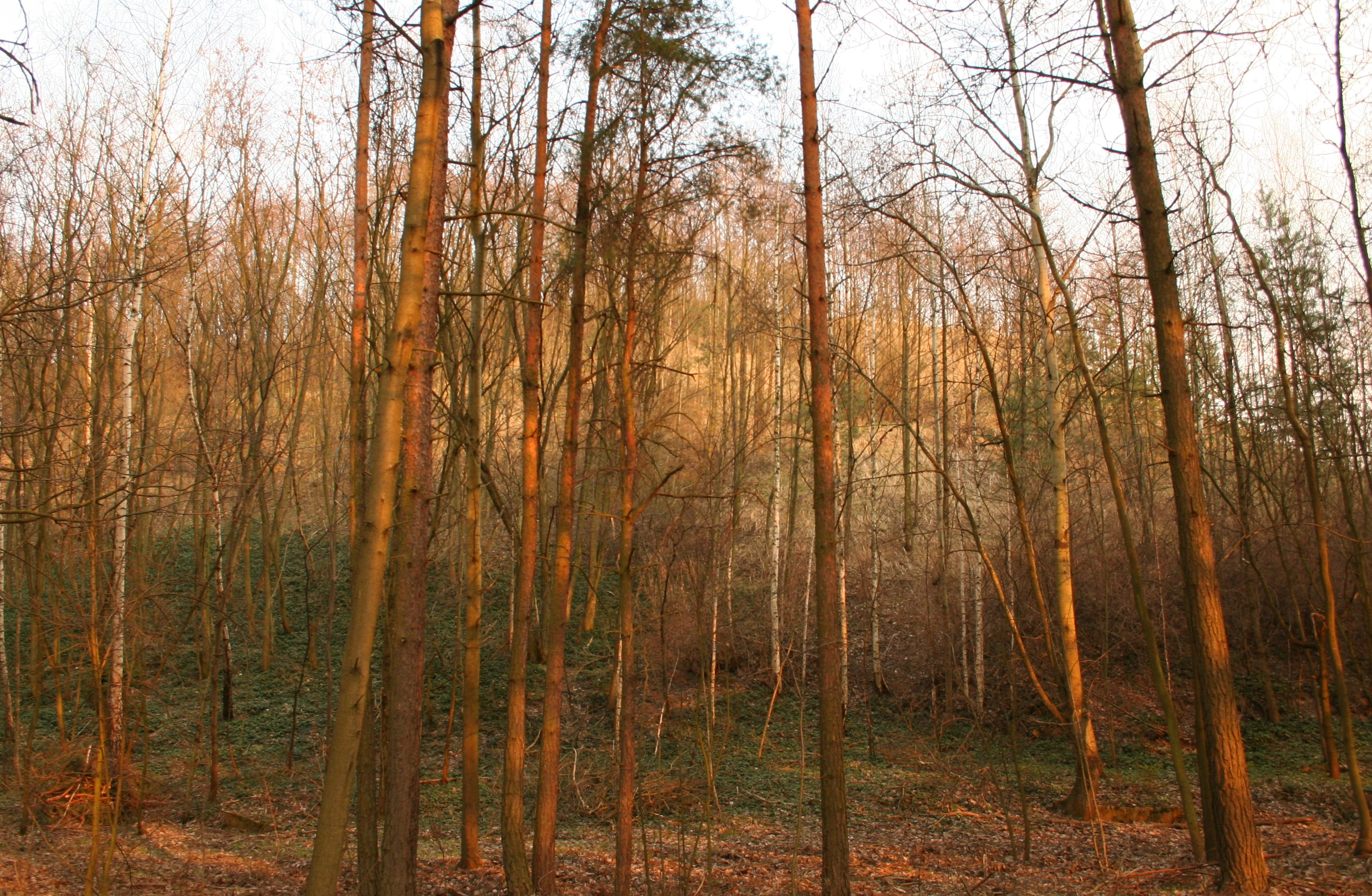 Hałda po kopalni żelaza w miejscowości Wręczyca Wielka, powiat kłobucki, województwo śląskie